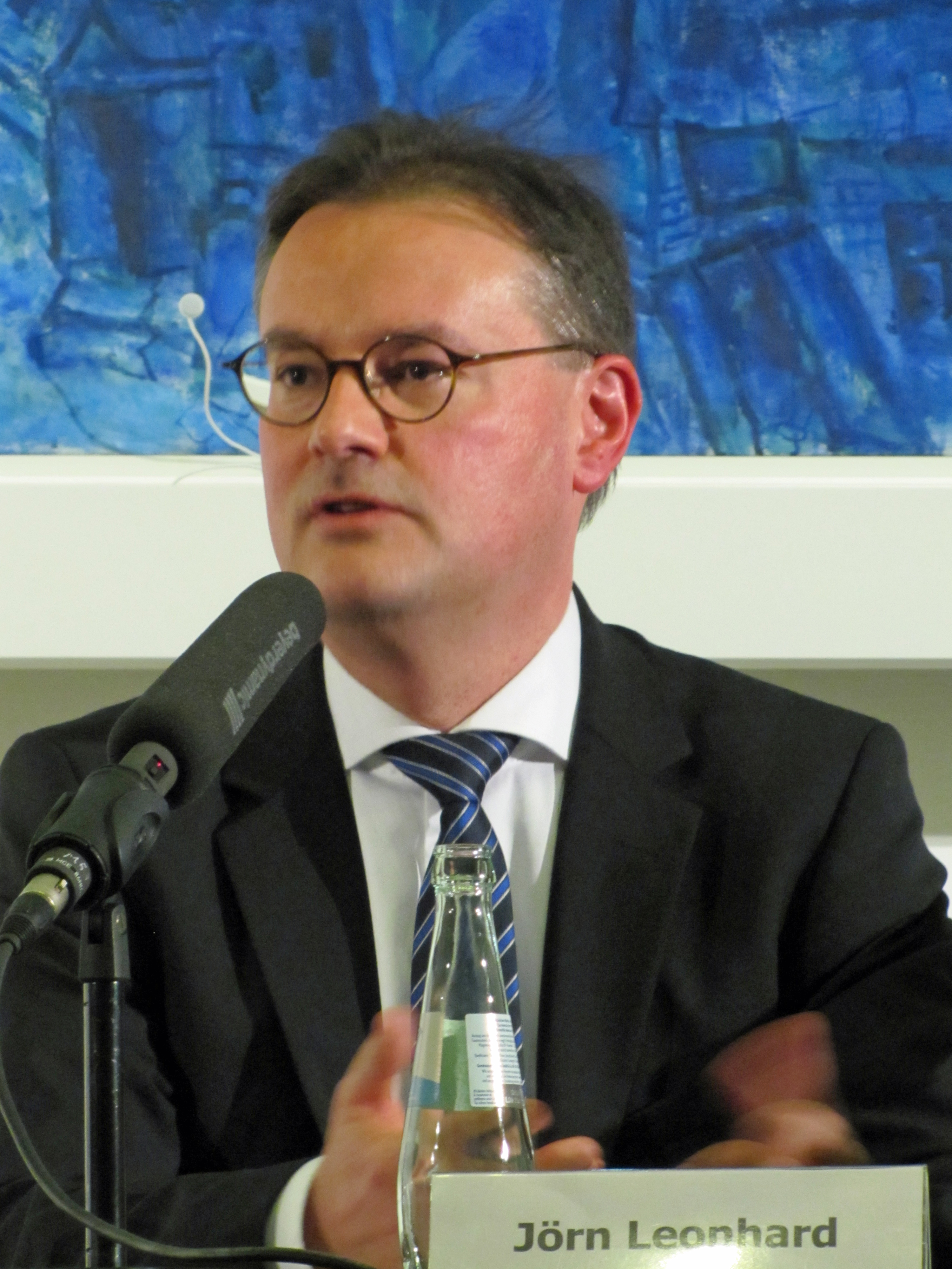 Jörn Leonhard, bei den Römerberggesprächen im Dezember 2014 in Frankfurt am Main.